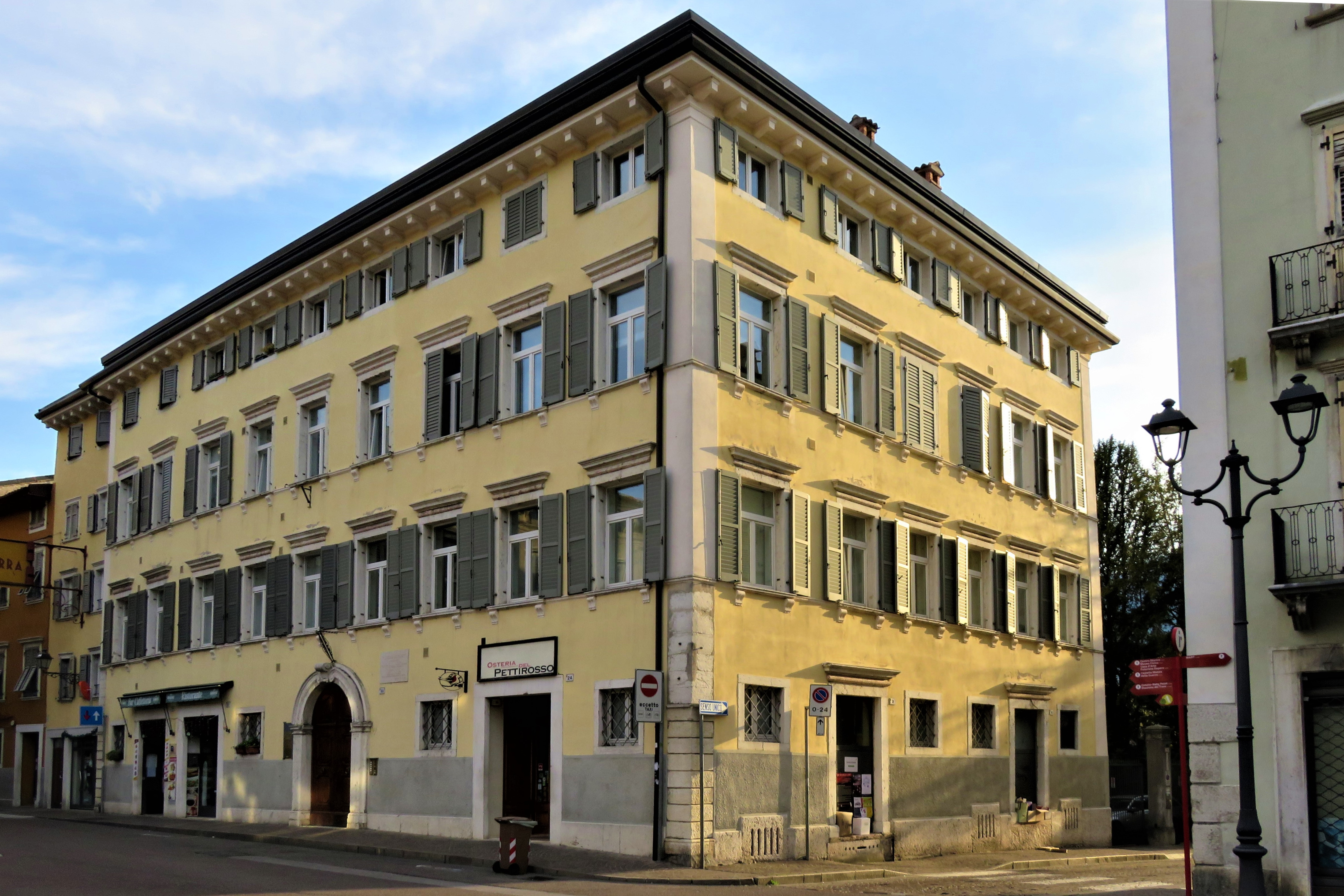 Casa Tolomei a Rovereto. Angolo tra corso Bettini e via Paganini